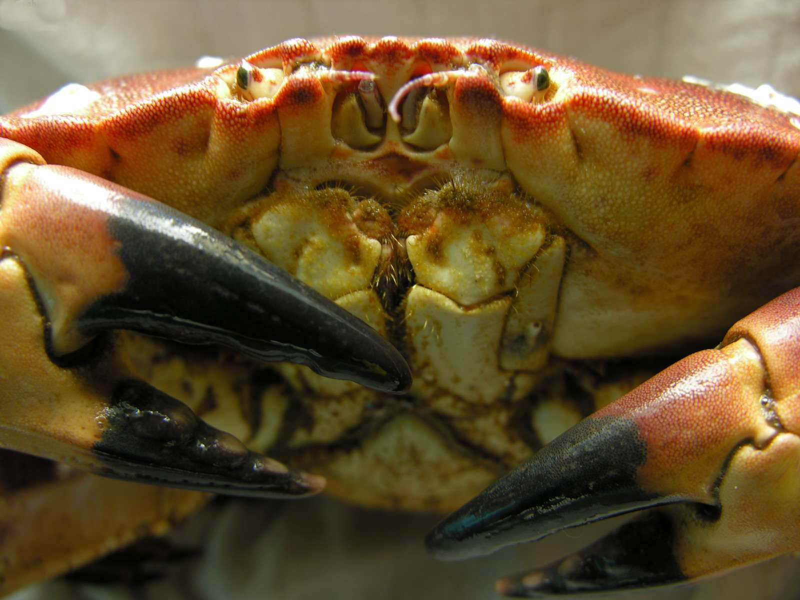 self made. Boiro - Galicia - Spain